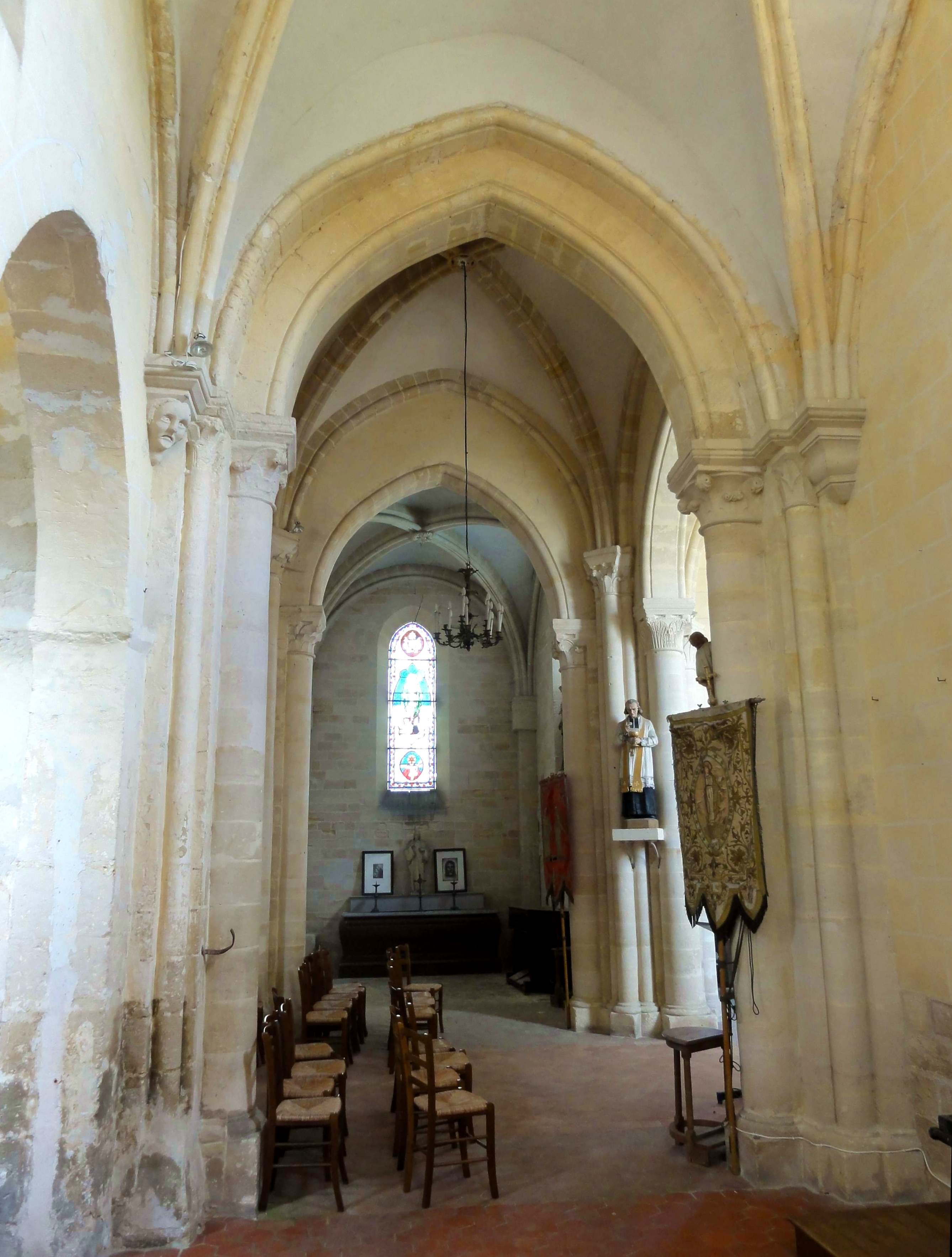 Intérieur de l'église (voir titre).